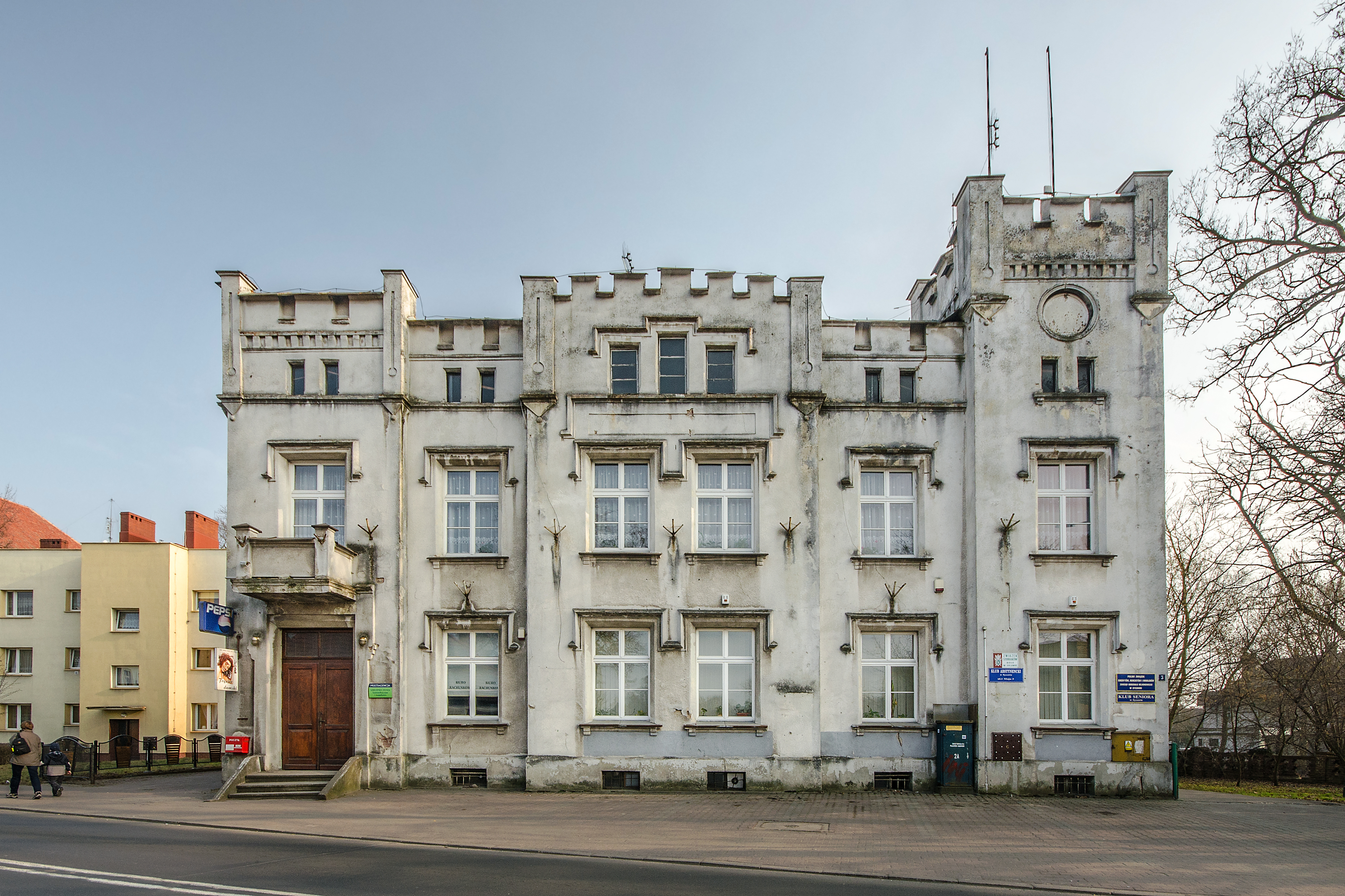 Syców, poczta, 1887